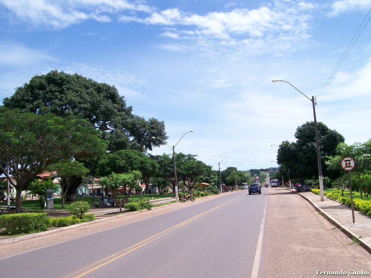 Rodovia Belém Brasília e Praça da Bíblia. Açailândia Maranhão.